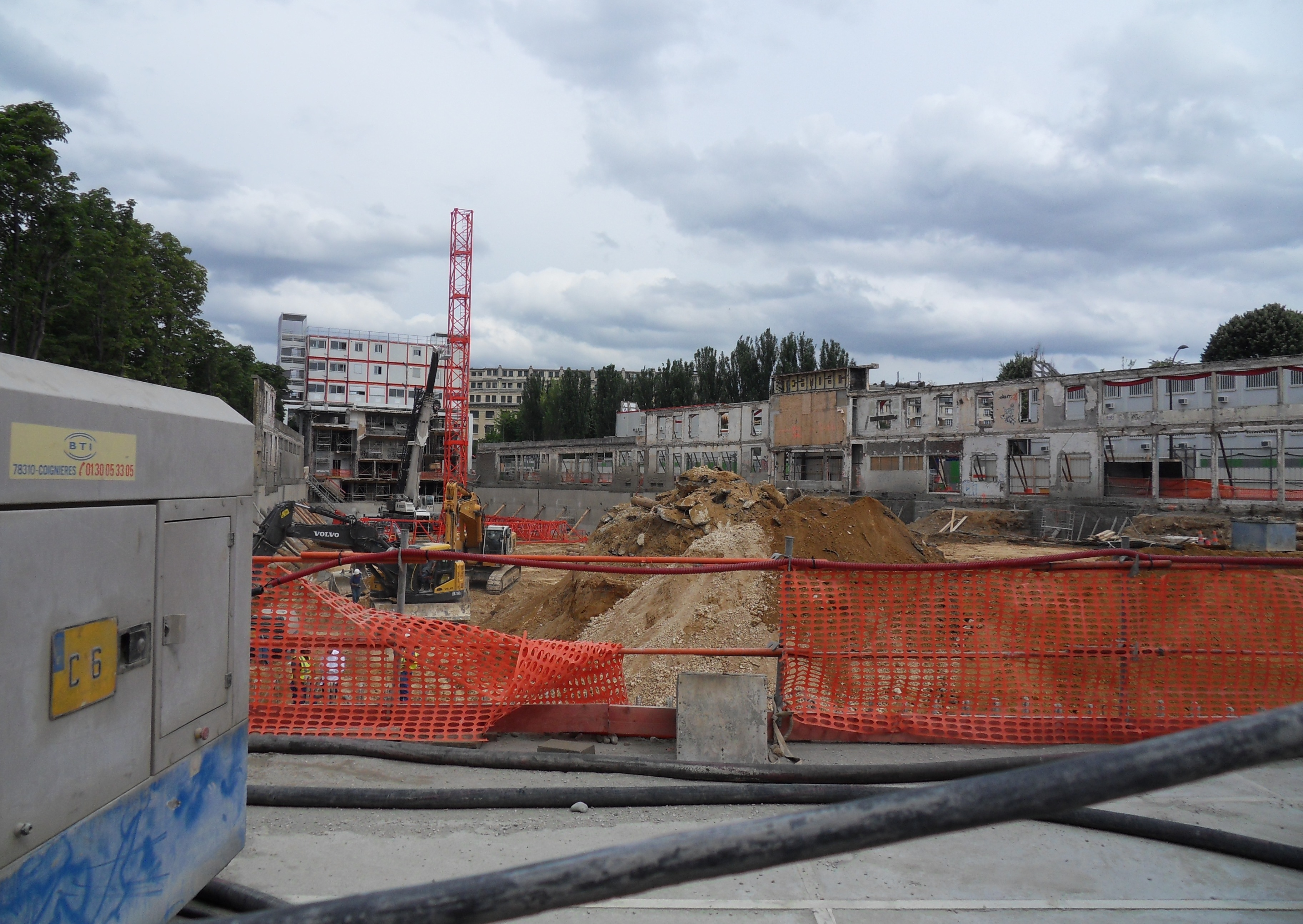 Reconstruction de la piscine Molitor (Paris), le 14 juin 2012.